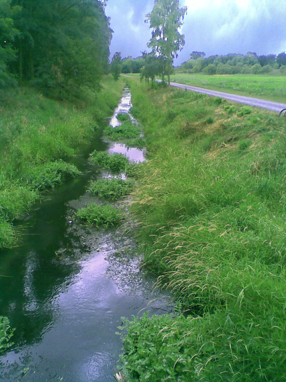 Panke unterhalb der Pankgrafenbrücke. Zwischen Buchholzer und Karower Flur fließt die Panke nach Südwesten westlich die Wiesen der vormaligen Rieselfelder linksseitig ein Waldstreifen und dahinter weiter östlich die Einfamilienhäuser von Karow.